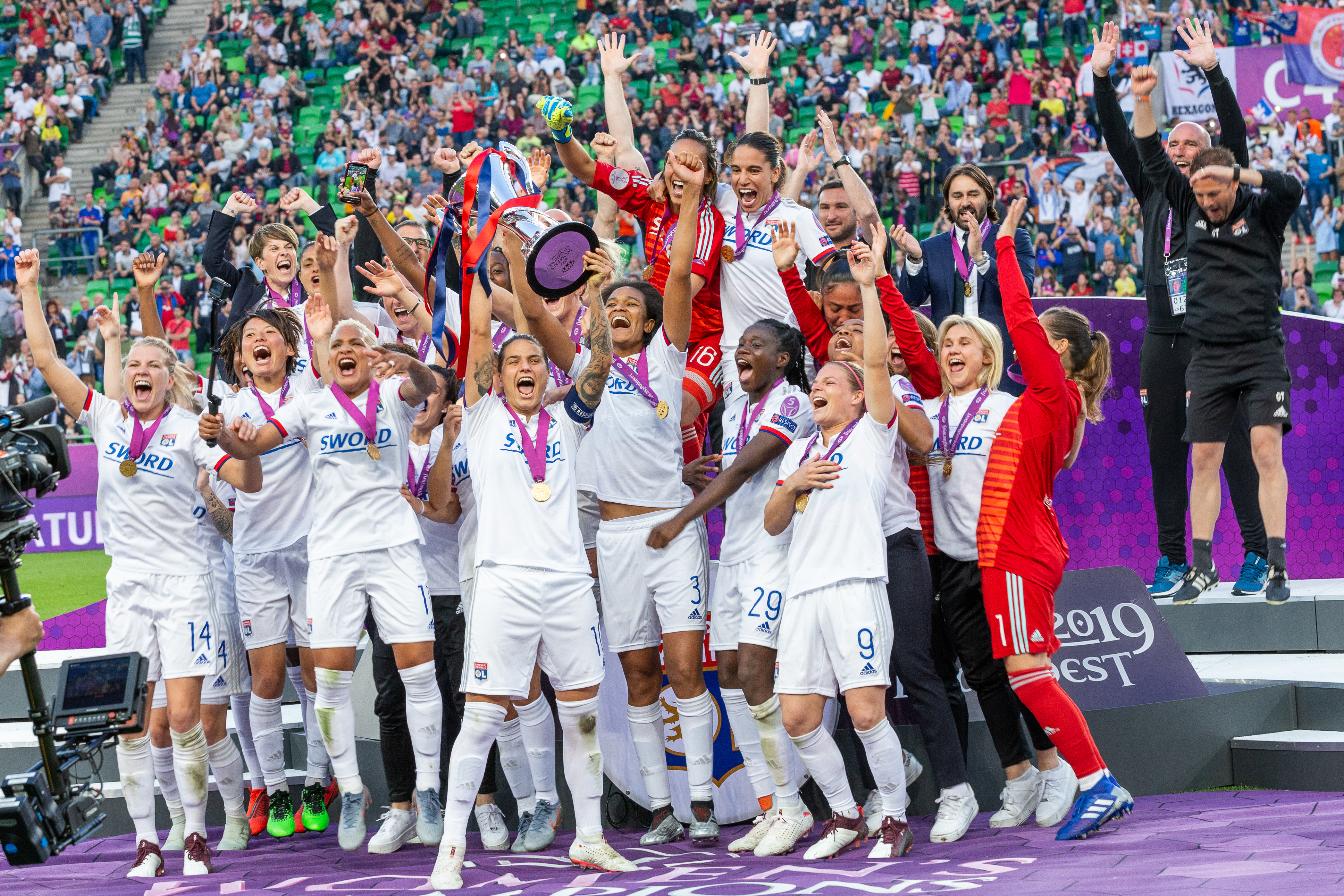 Fußball, Frauen, UEFA Women's Champions League, Olympique Lyonnais - FC Barcelona; Olympique Lyonnais feiert den erneuten Titel; Jubel, celebration